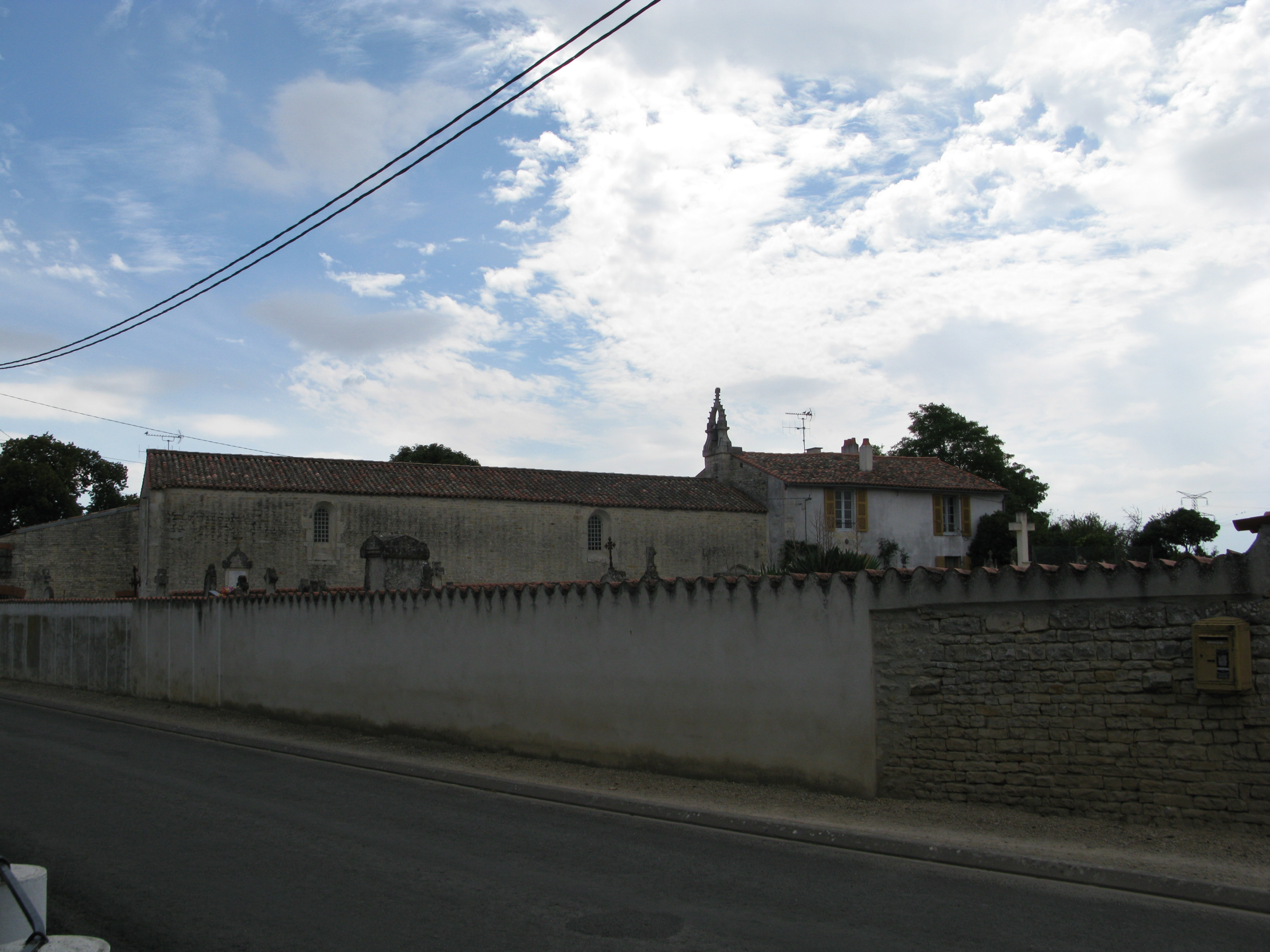 Cimetière de Priaires, et église.